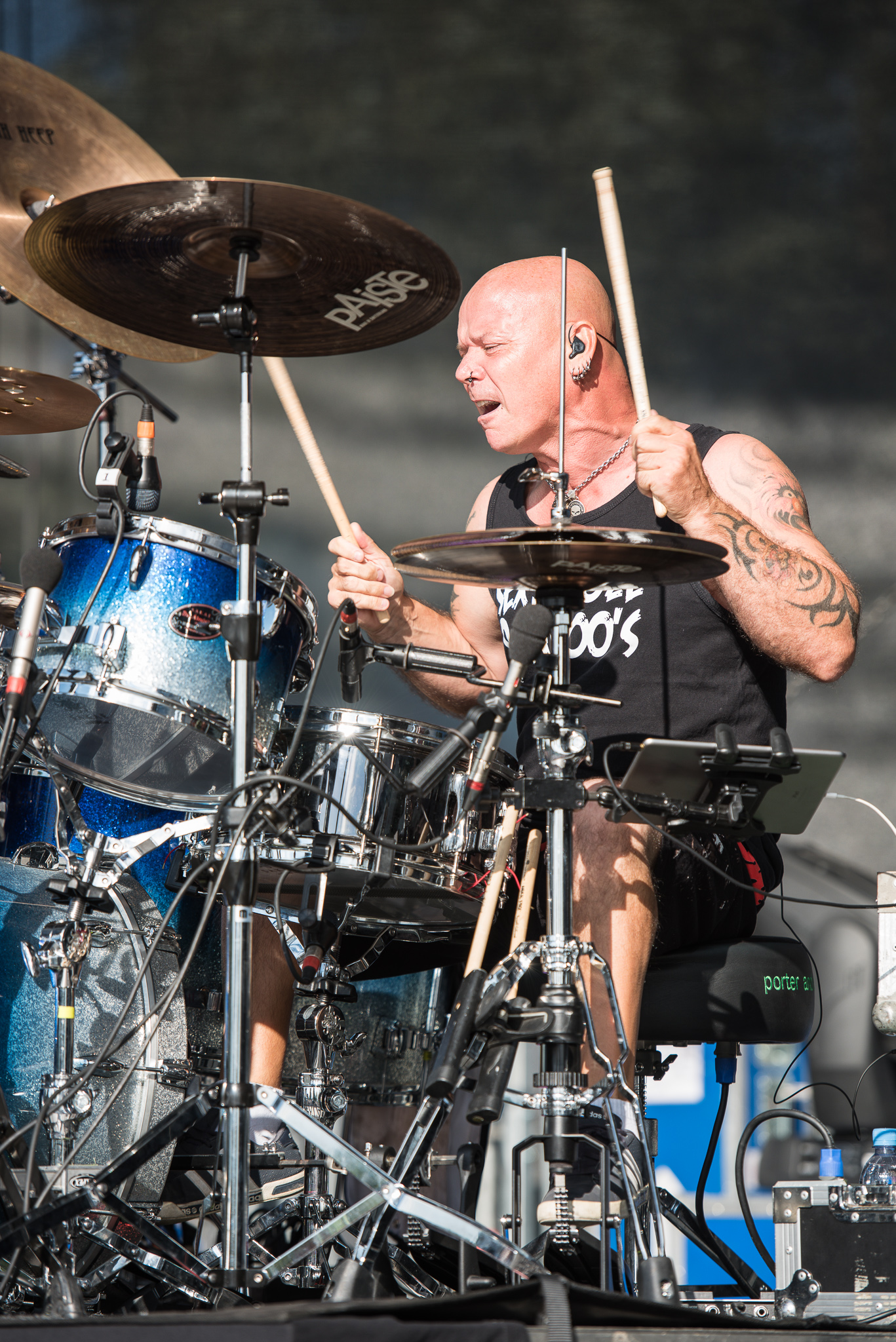 Brombachsee,Concertbüro Franken,Festival,Konzert,Lieder am See,Livekonzert,Livemusik,Musik,Russell Gilbrook,Uriah Heep